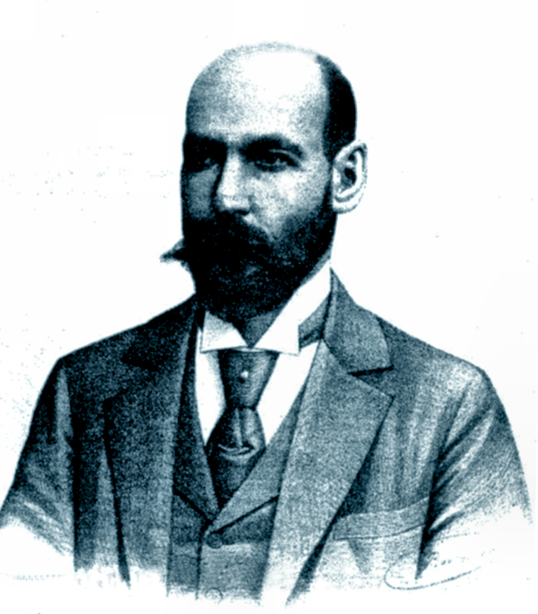 Rudolf Schuster von Bonnott 1908